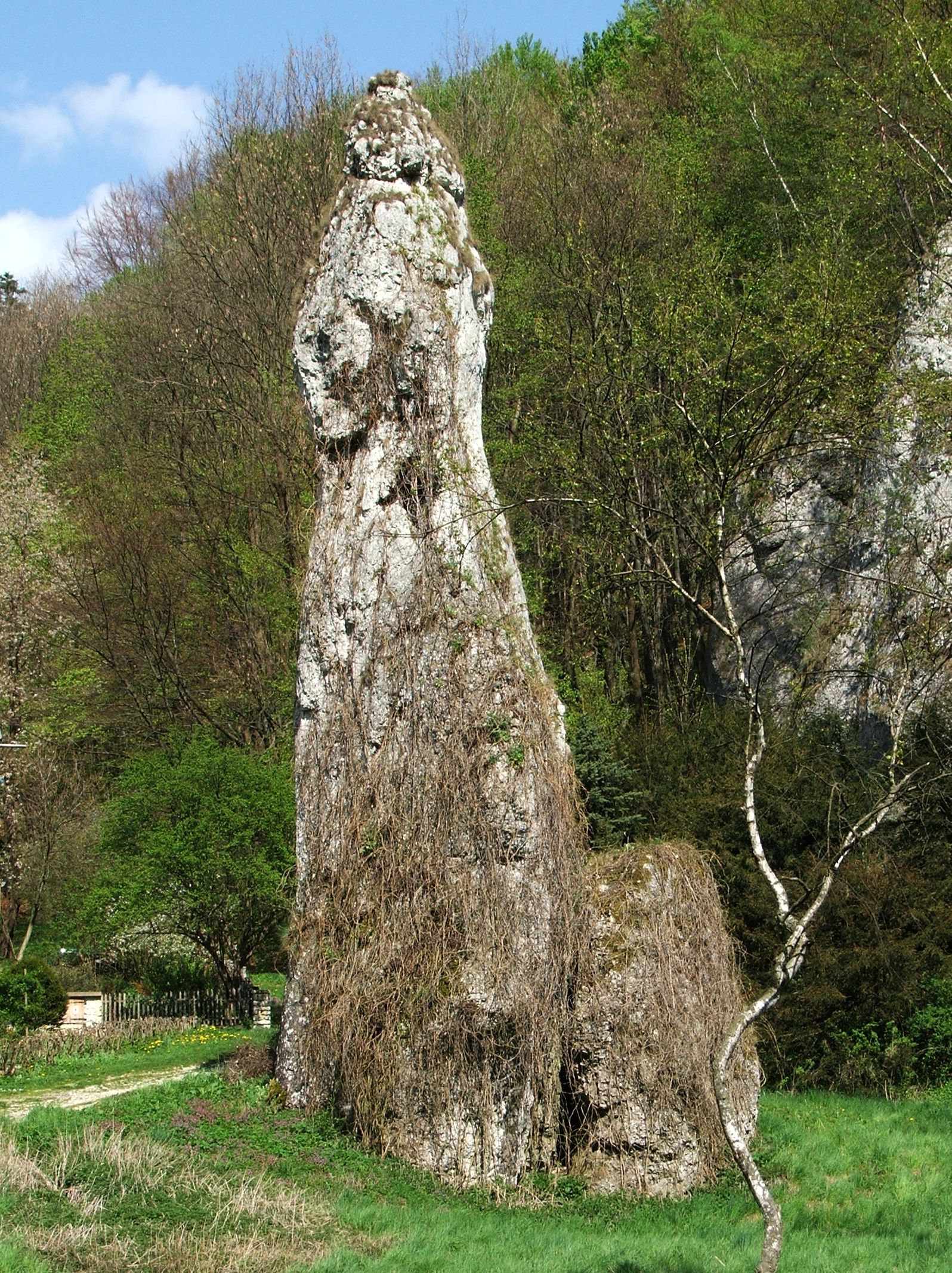 Dolina Prądnika (Ojcowski Park Narodowy). Igła Deotymy